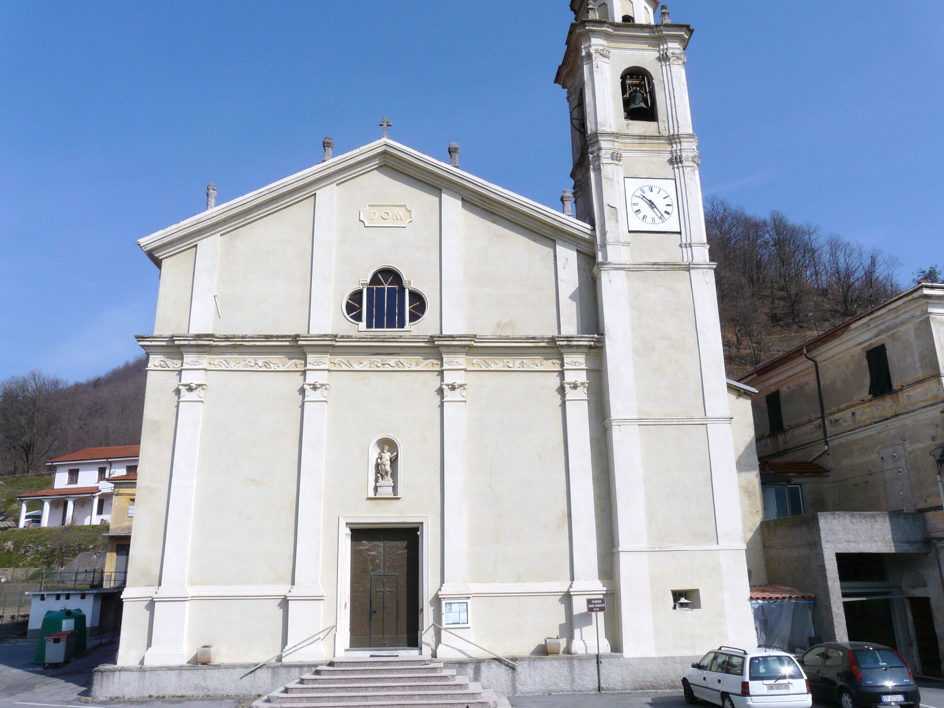 Chiesa di San Marco, Pallare, Liguria, Italia